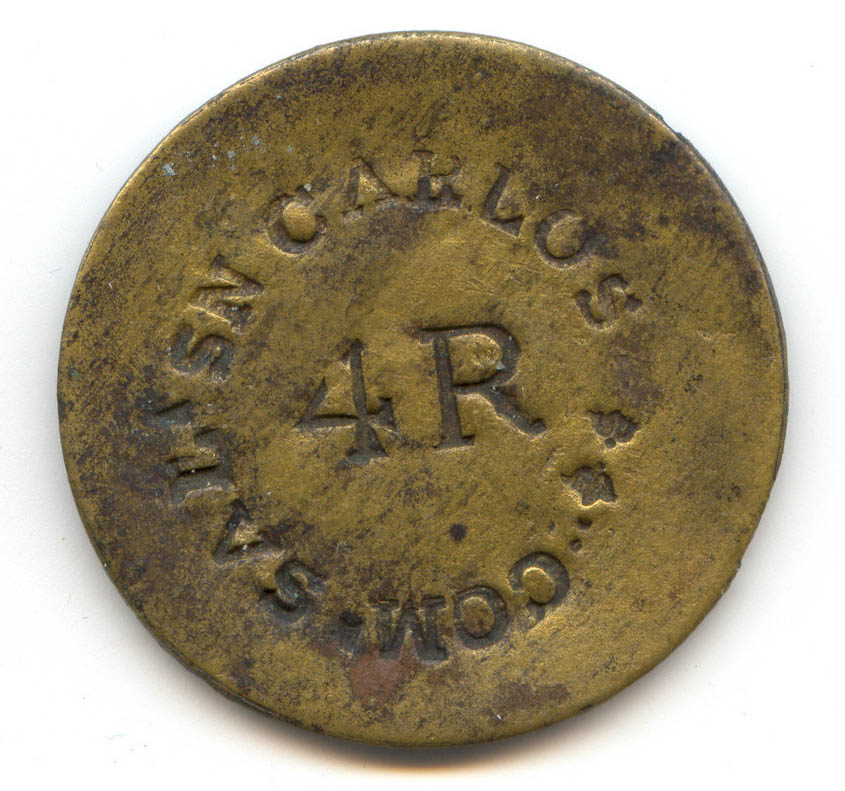 Ficha salitrera perteneciente a la Oficina San Carlos, Tarapacá. Hacia 1860. Latón, unifacial, fabricada con un martillo acuñador.